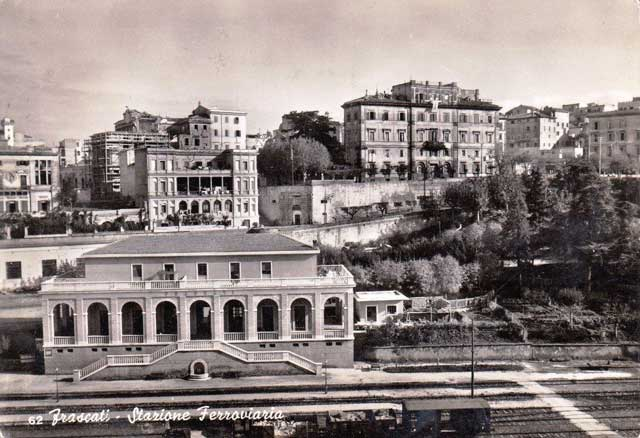 Panorama della stazione